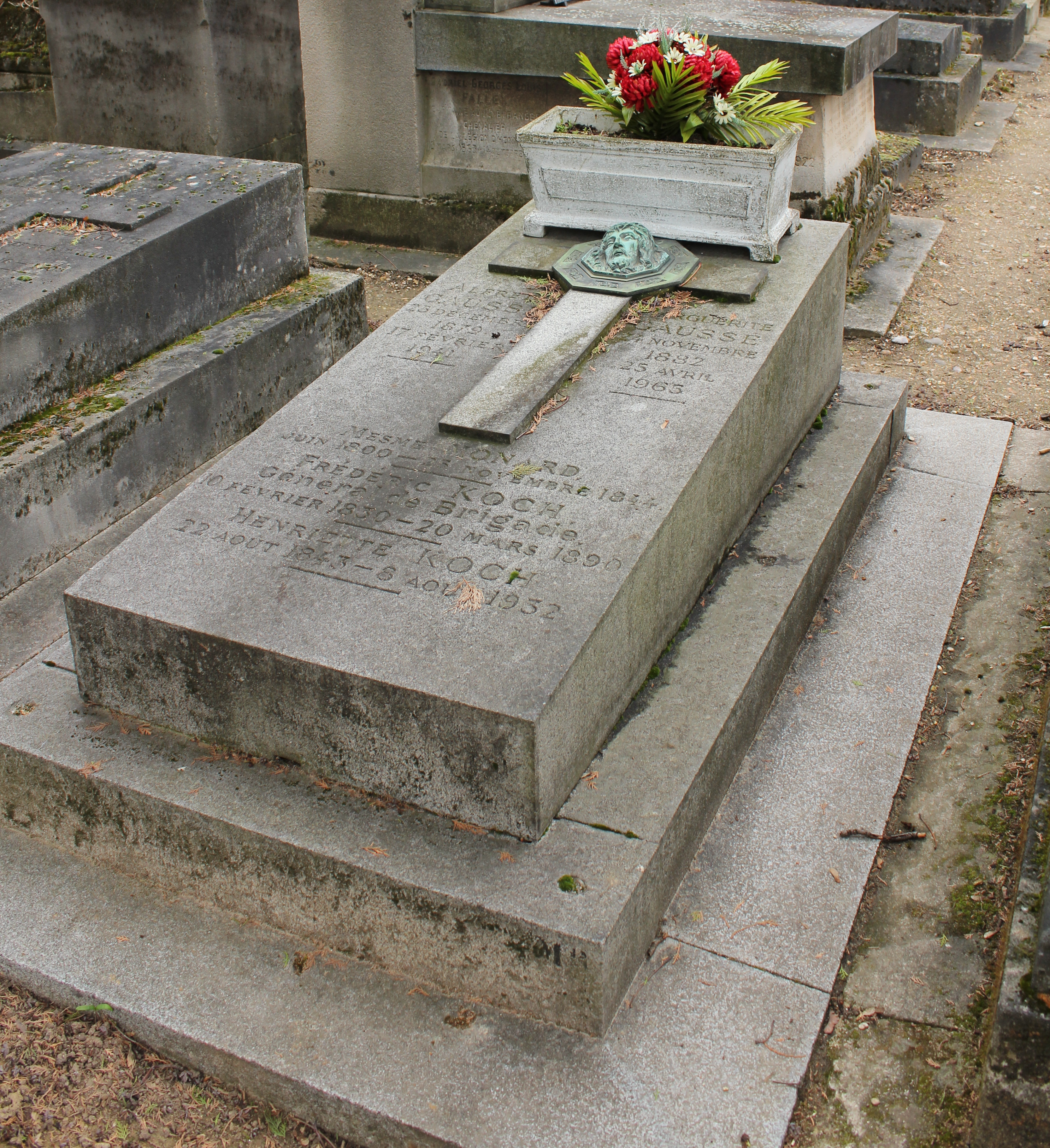 vue générale